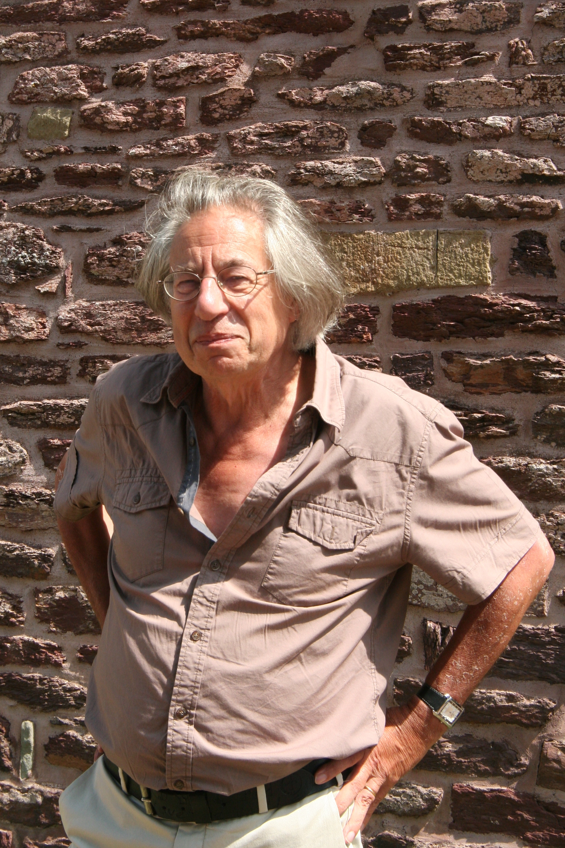 Bernard Sergent au château de Comper lors des Rencontres de l’imaginaire de Brocéliande de 2014.